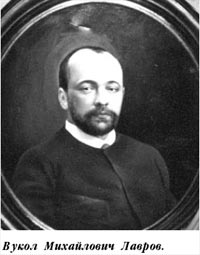 Вукол Лавров